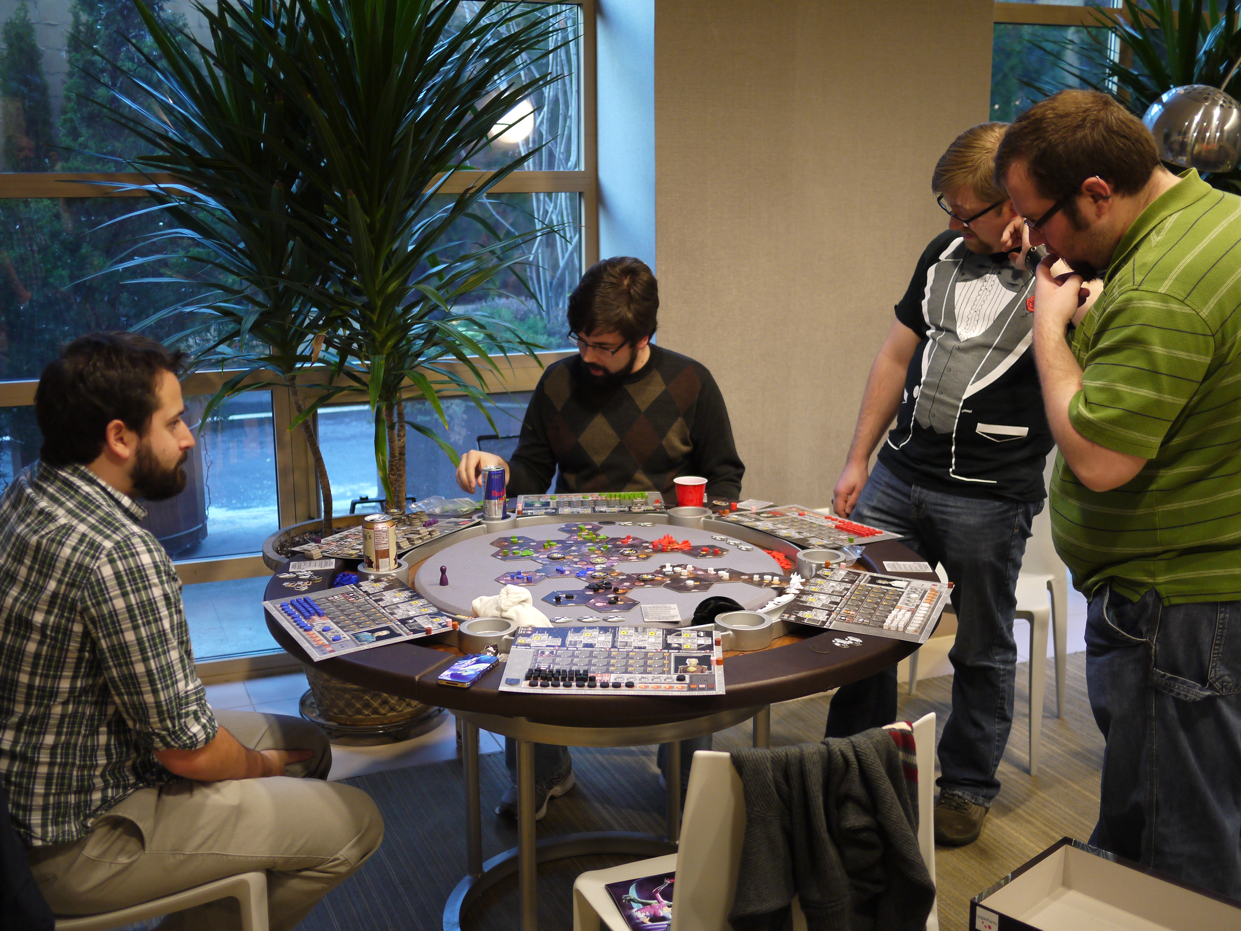 Jeu de société Eclipse